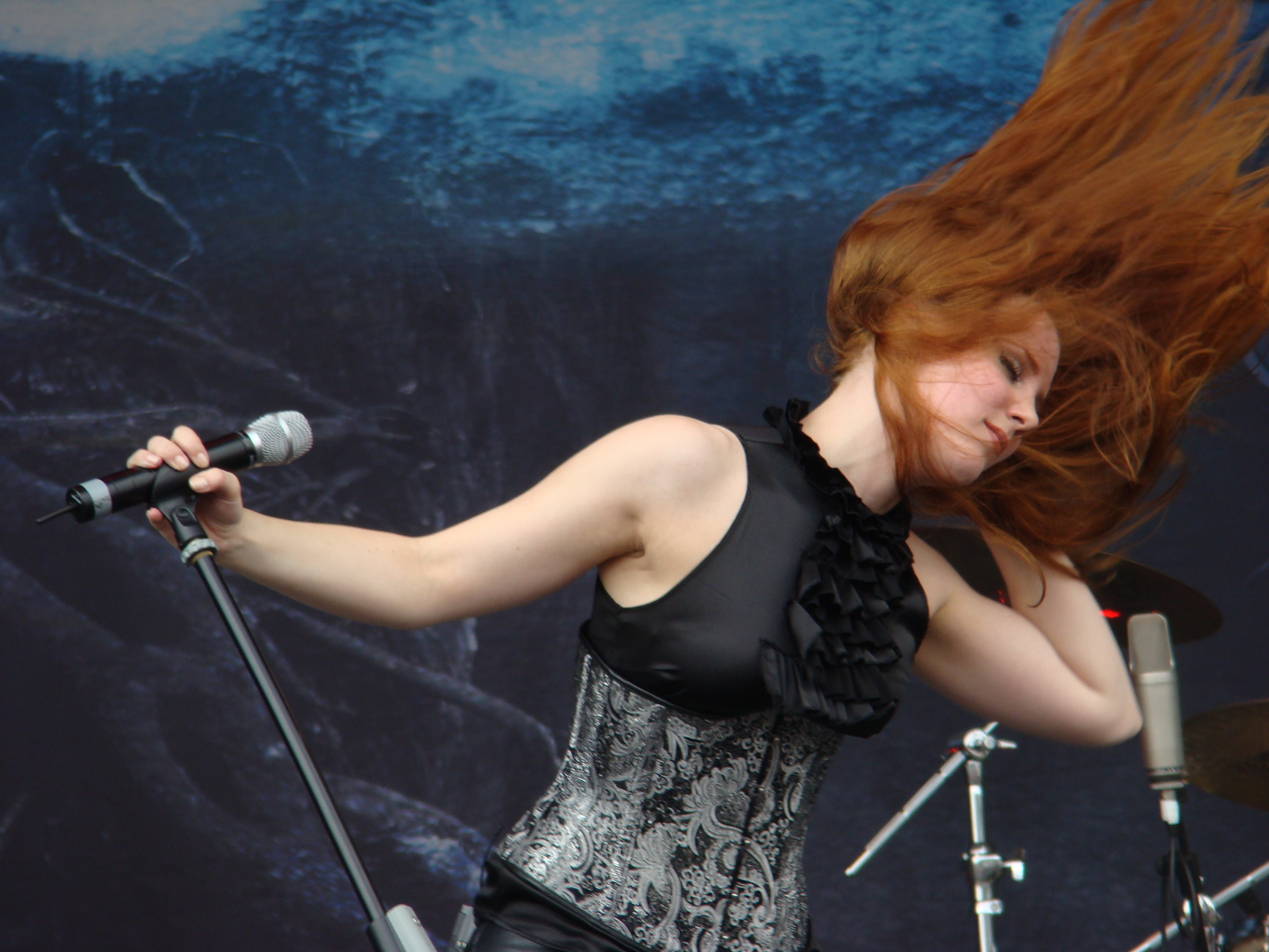 Simone Simons